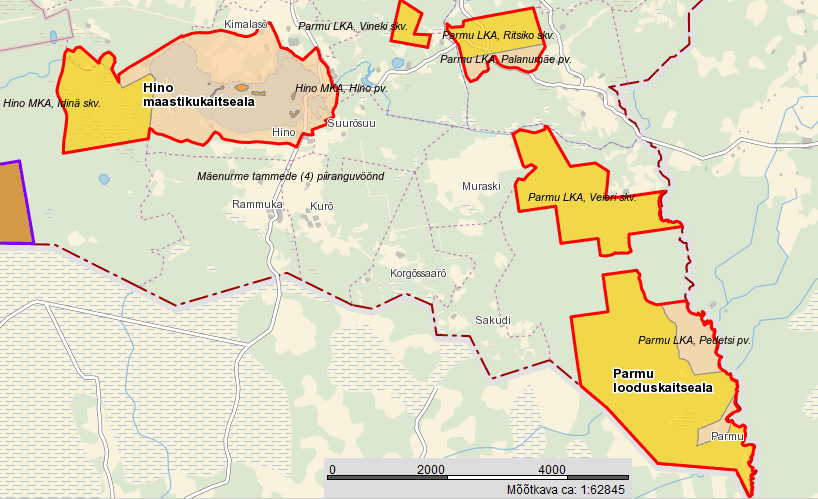 Hino MKA ja Parmu LKA Maa-ameti kaardil.